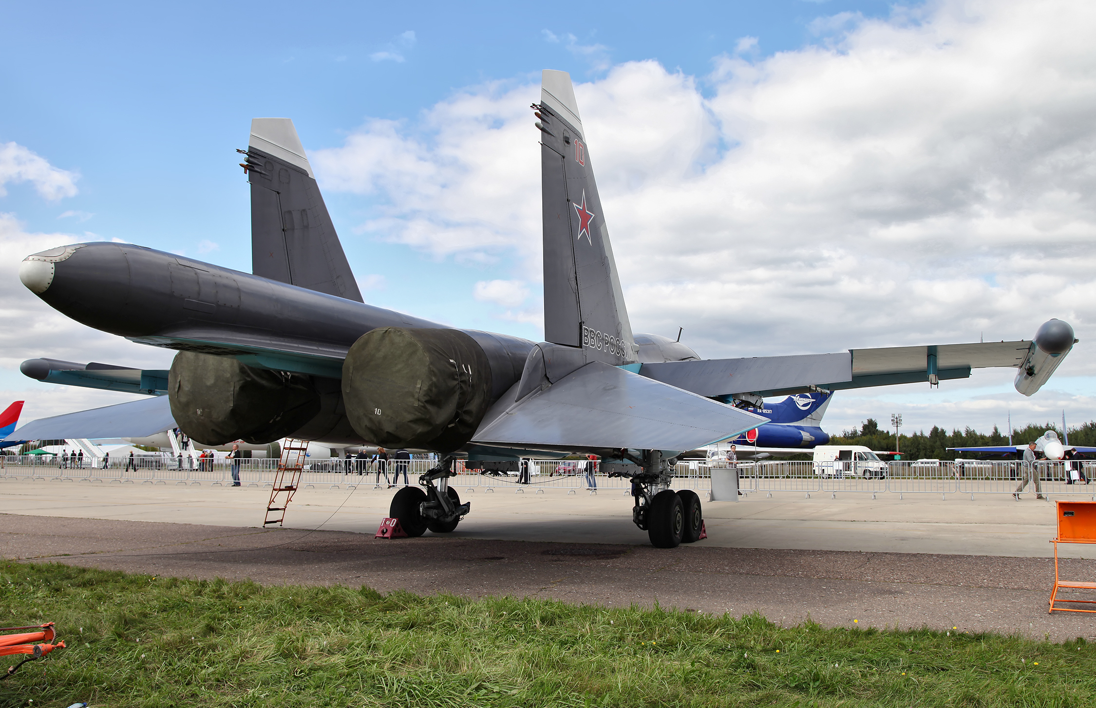 Су-34 (Su-34)